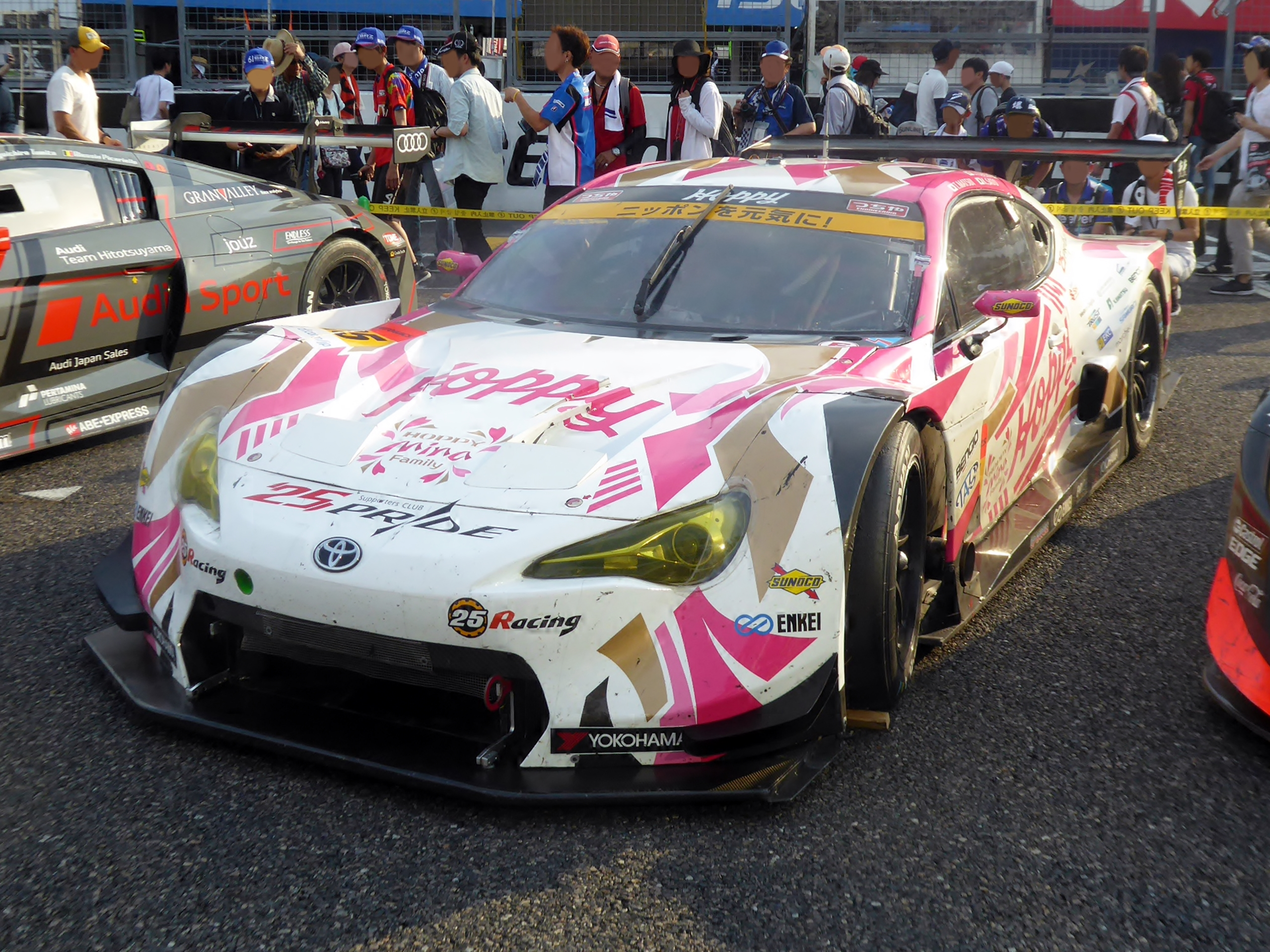 2019年鈴鹿GT300㎞終了後の25号車HOPPY 86 MCを撮影。